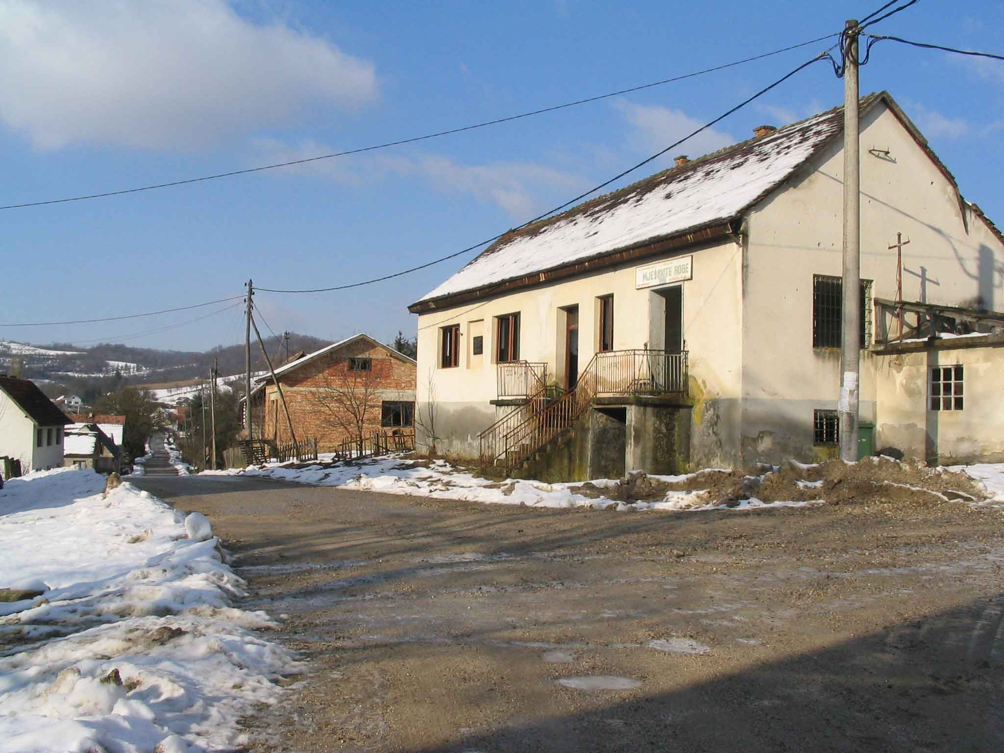 Centar Velike Graduse